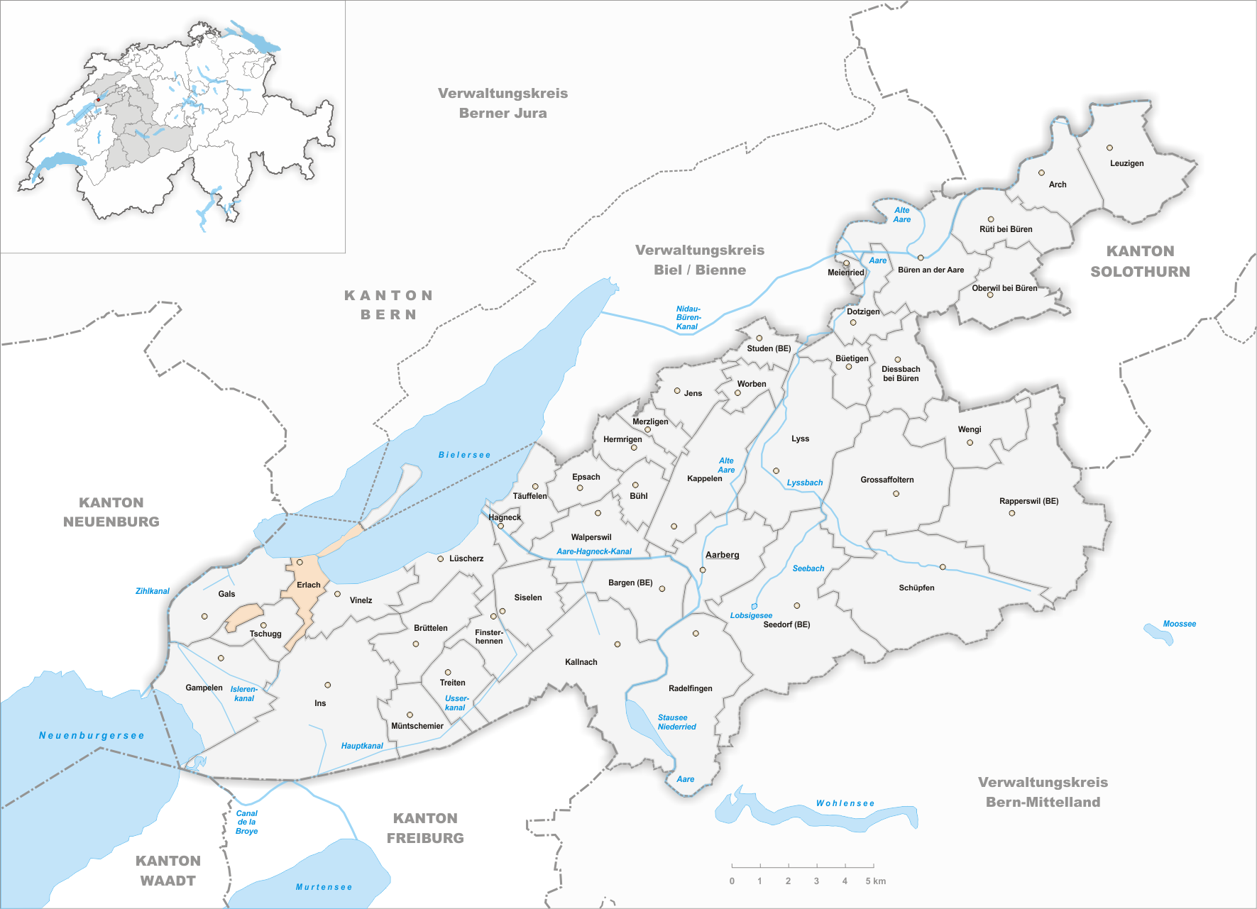 Municipality Erlach